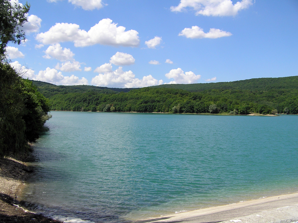 Зеркало балановского водохранилища (Крым, Украина)